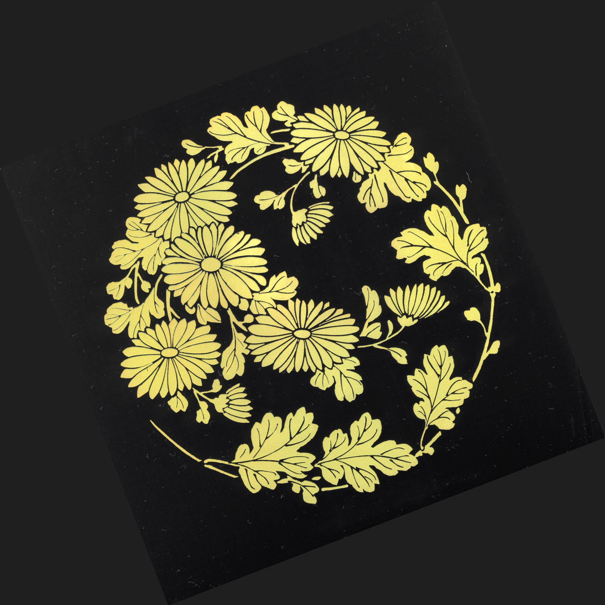 蒔絵